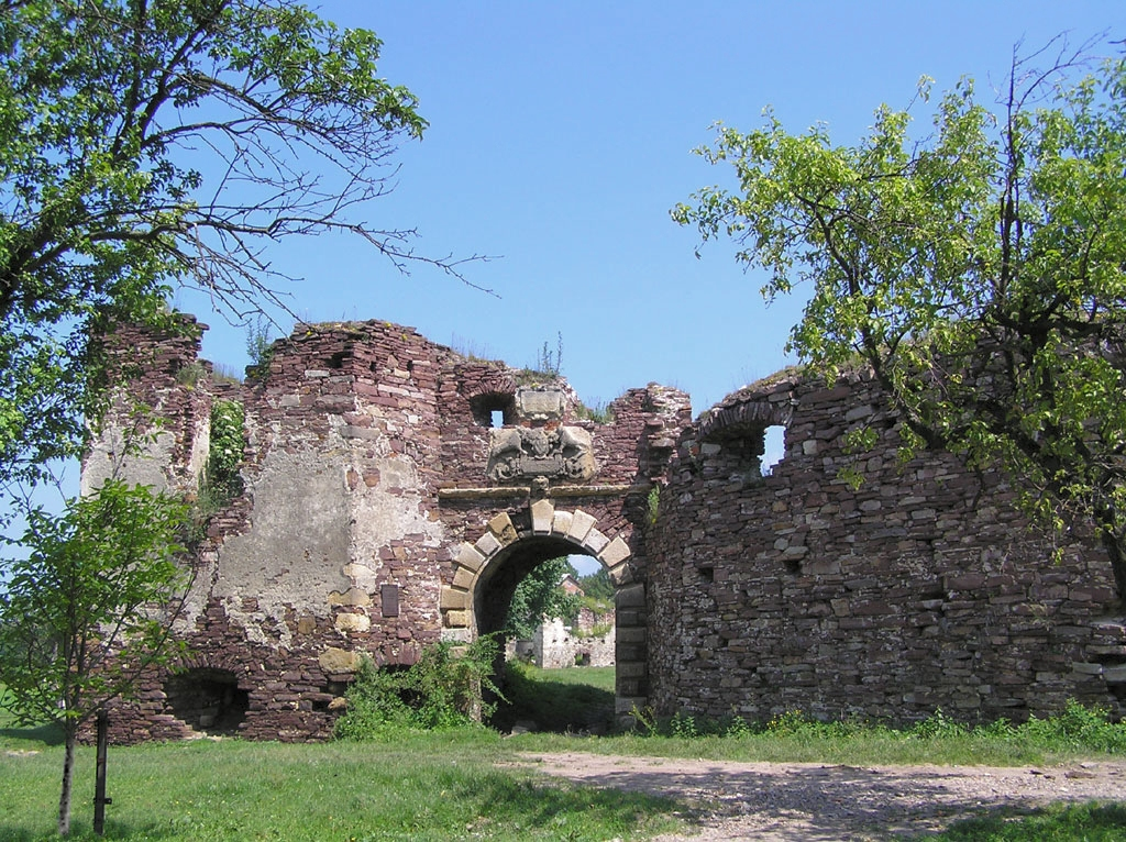 Подзамочек, замок